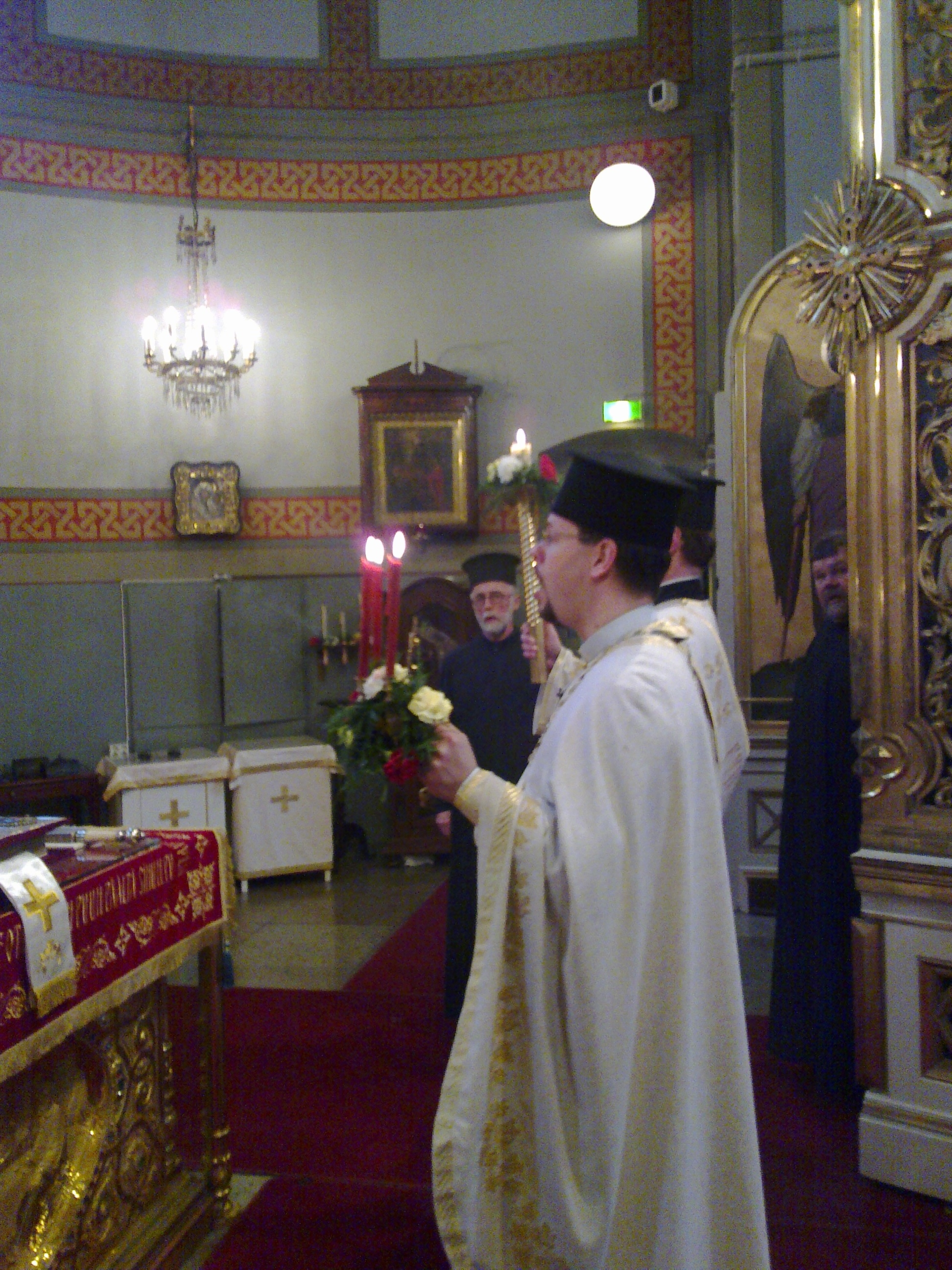 Pääsiäiskynttelikkö ortodoksisen papin kädessä